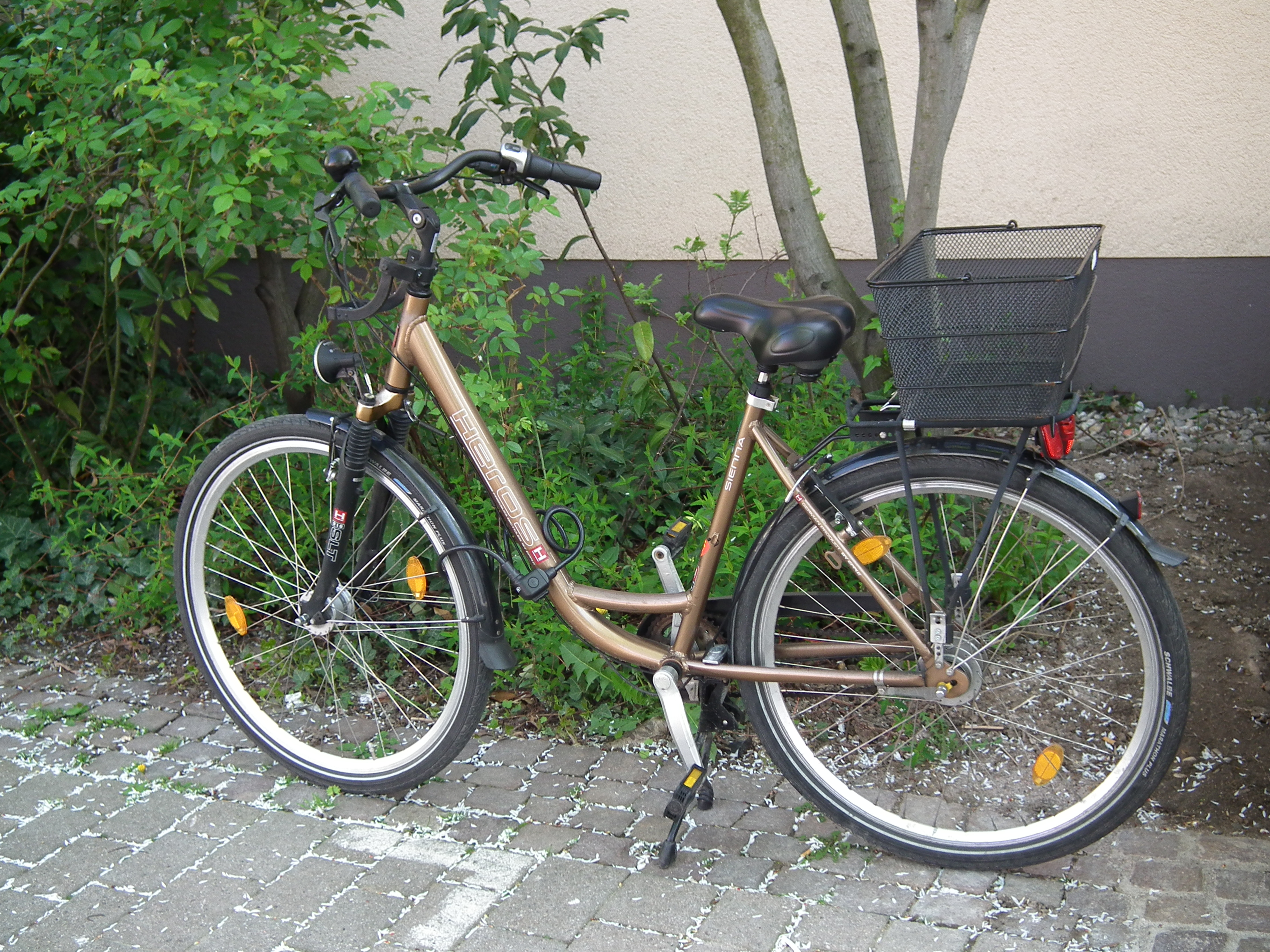 Fahrrad mit Fahrradkorb der Marke Heros, Modell Sienna